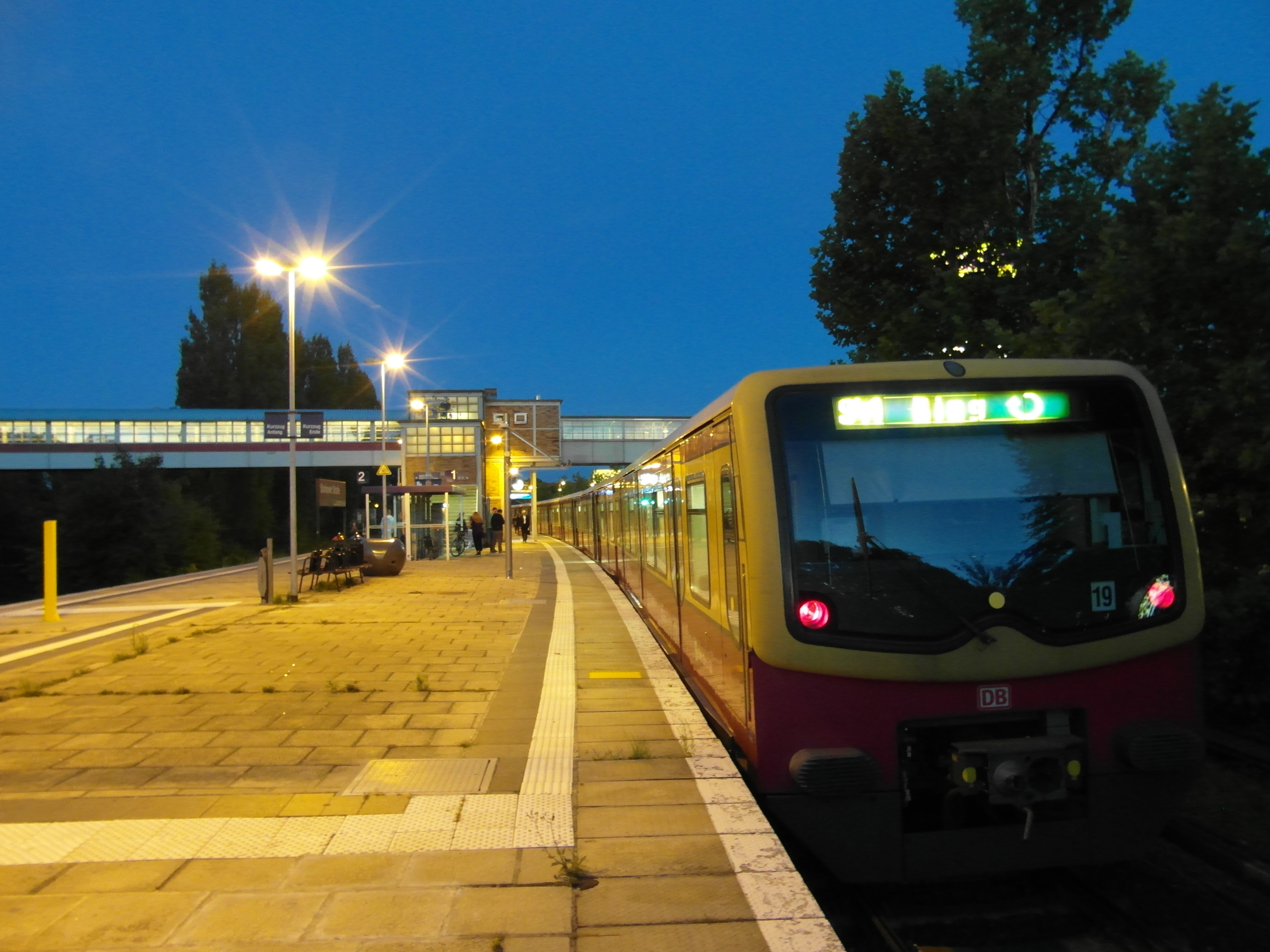 Ringbahn - Linien S41, S42, S8 - zur Zeit auch S9 und vielleicht auch mal wieder S85